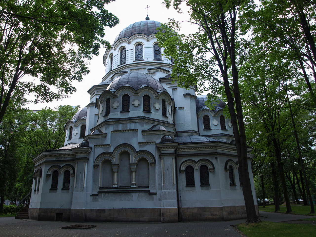 Kosciol Garnizonowy w Kielcach – widok od wschodu